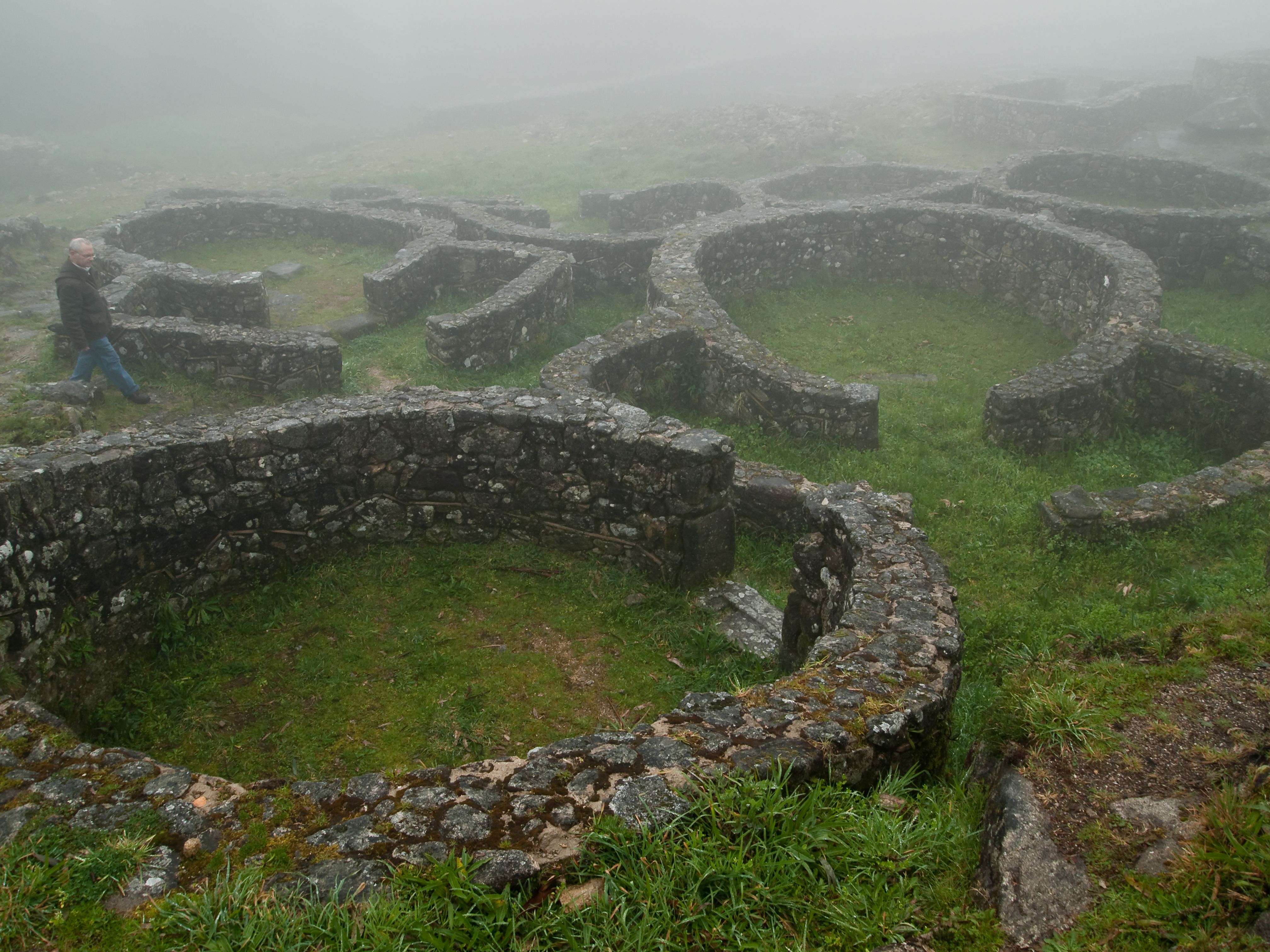 Castro de Santa Trega, A Guarda